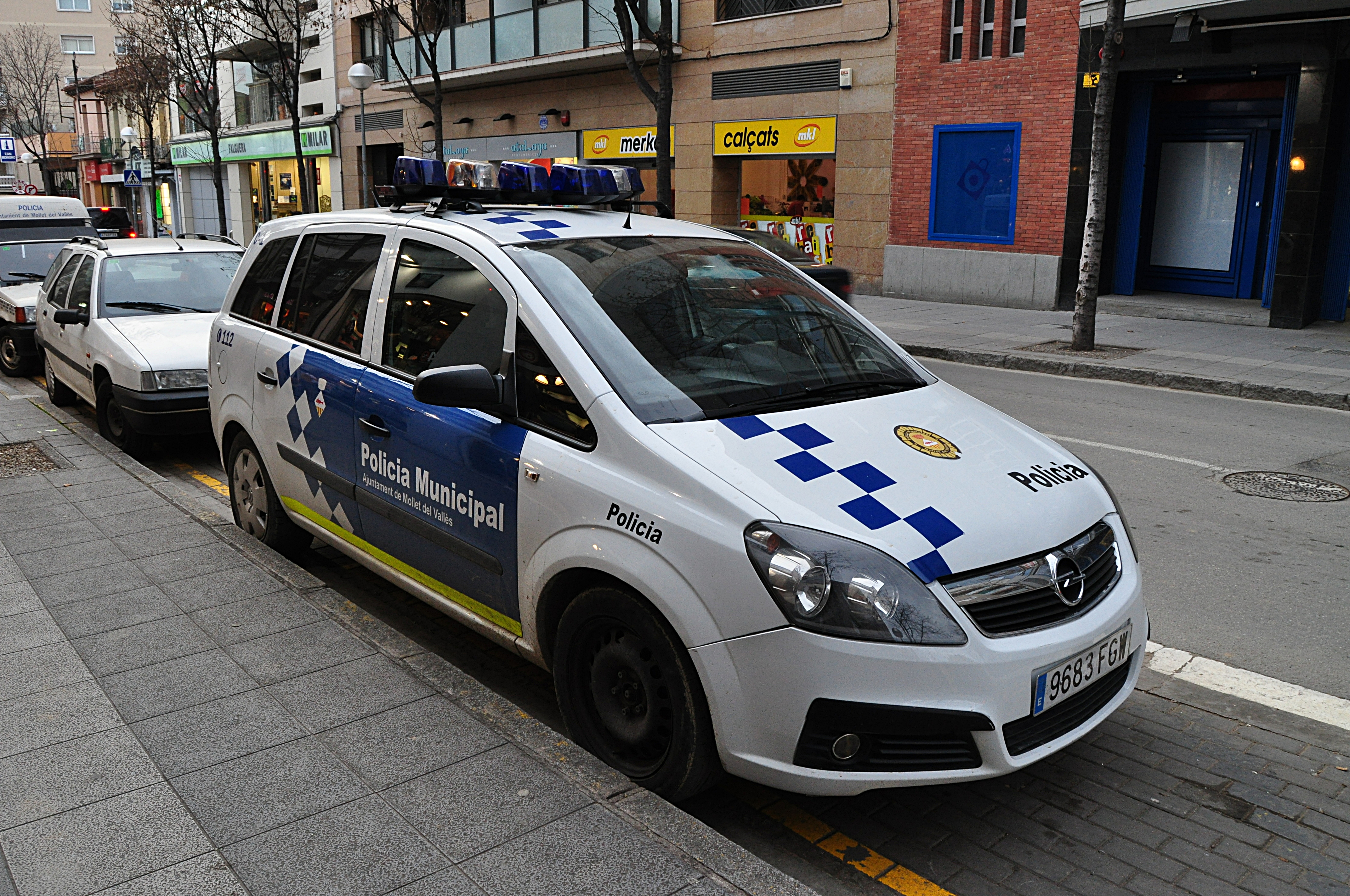 Mollet del Vallès: Coche de la policia municipal frente a su comisaria en la calle Jaume I.